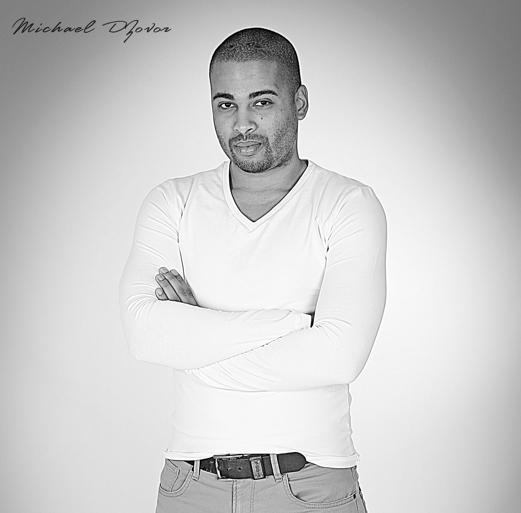 Film & Videoproduzent Michael Dzovor